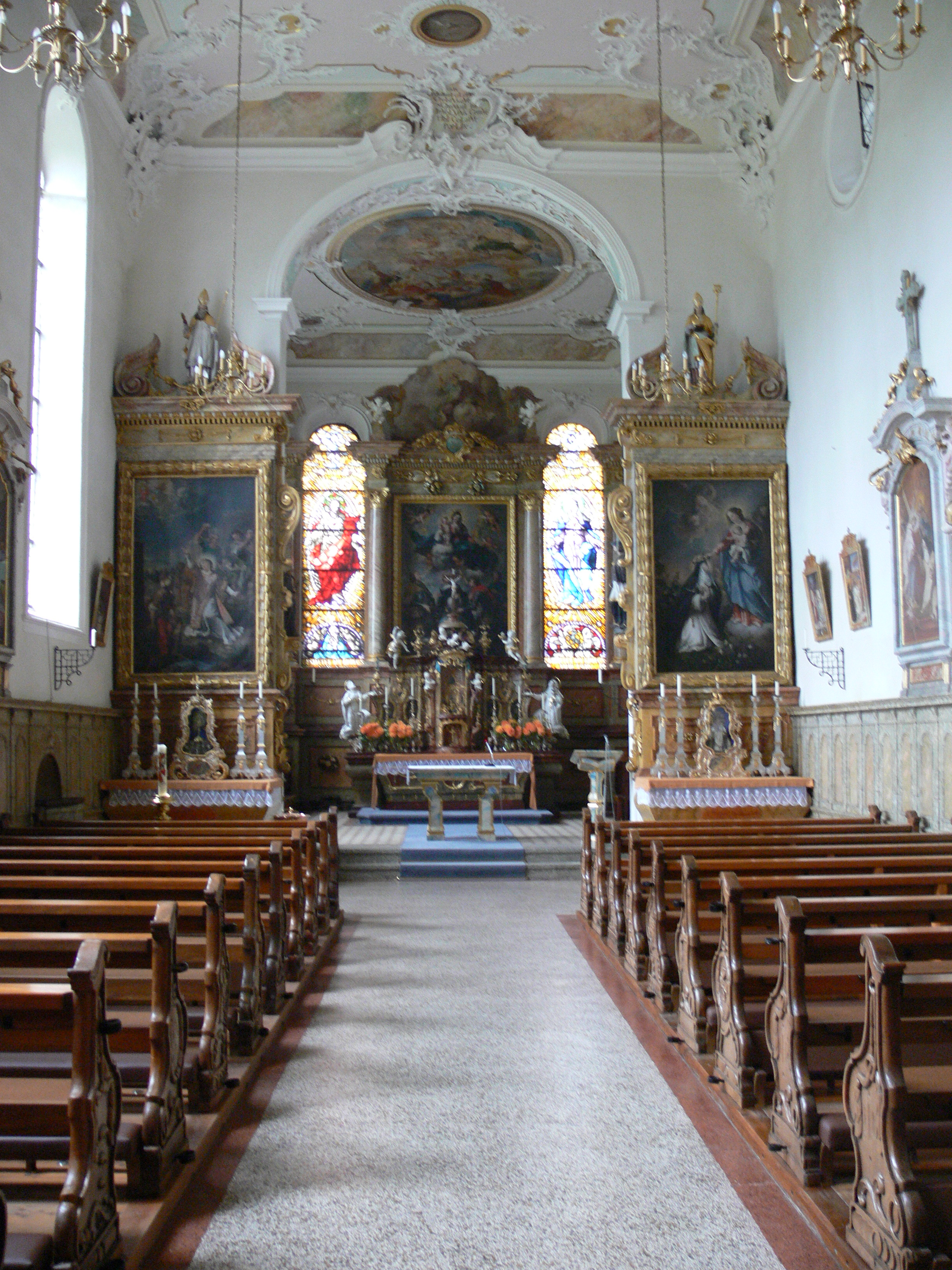 Kloster Habsthal, Gemeinde Ostrach, Landkreis Sigmaringen Pfarr- und Klosterkirche St. Stephanus Blick in die Kirche zum Altarraum